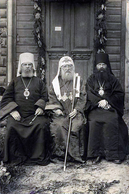 митрополит Петр (Полянский), Париарх Тихон и епископ Алексий (Готовцев) в Серпухове.